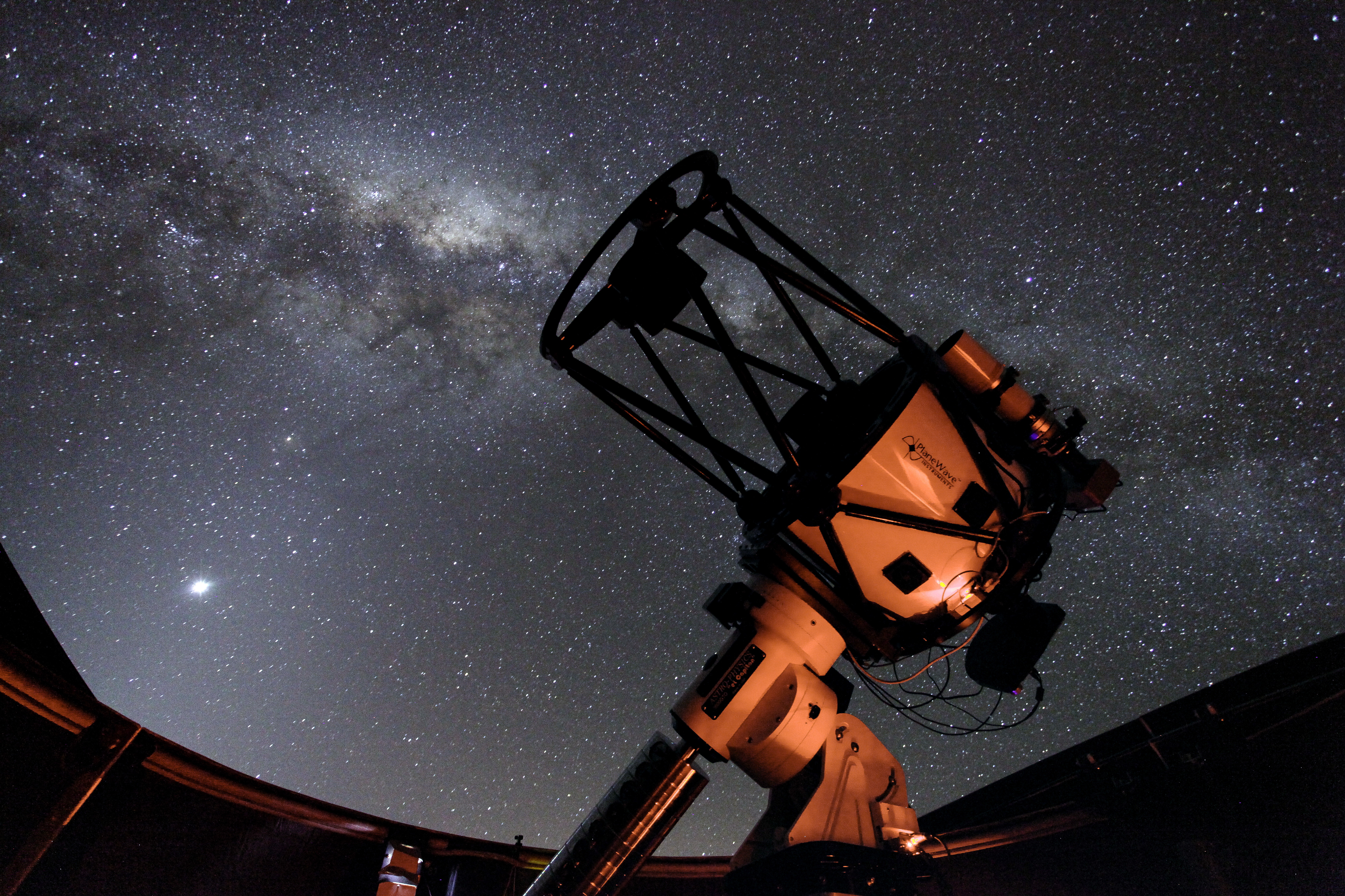 กล้องโทรทรรศน์ทางไกลอัตโนมัติ ณ Cerro Tololo Inter-american Observatory, Chile